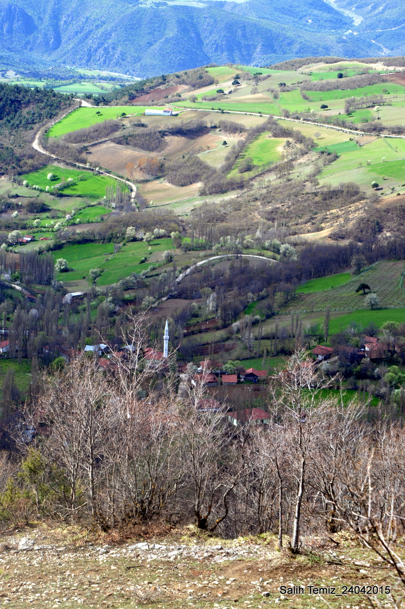 Gümüşalan'da ilkbahar